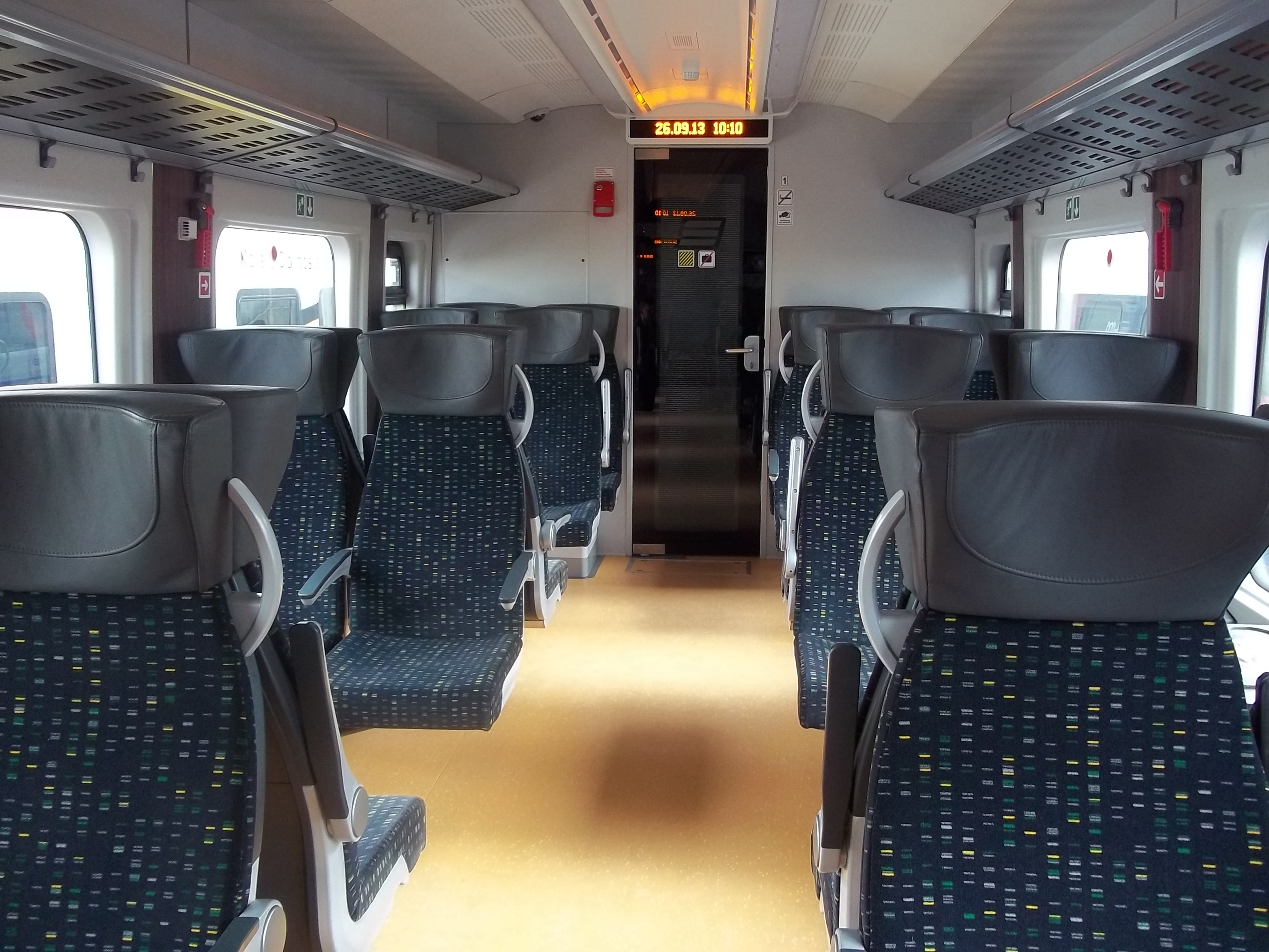 Spalinowy Zespół Trakcyjny "Link" wyprodukowany przez PESA Bydgoszcz SA dla Regentalbahn AG.